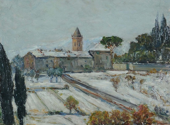 "Paesaggio innevato", olio su cartone, 30 x 40 cm, firmato, coll. privata